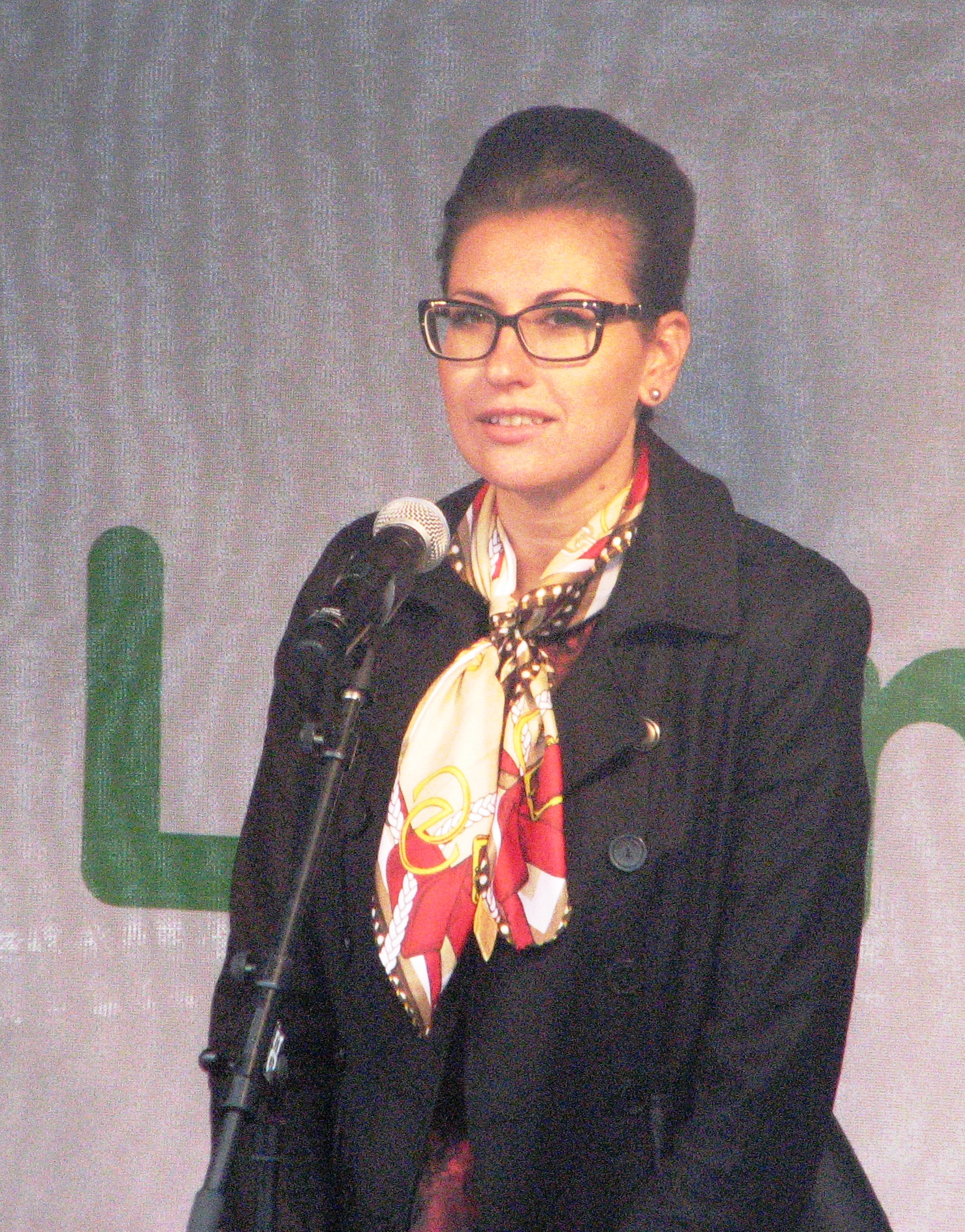 Olga Ivanova esinemas Lasnamäel Linnapoe avamisel